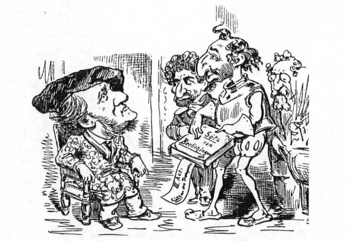 Wagner in Wien. Ausschnitt aus einem Tableau. Teiltext: "Do, rö, mü, fa, so, la, si, do. Im Nomen vün da Journalistik, was Se hassen, waanen kennt mer, bring' ich Ihnen, weil Se kä Zeitung lesen, waanen kennt mer, ä classische Antwort, was in kaaner Zeitung, sündern im Goethe steht ünd ünter üns gesagt ä scheen's Compliment ist – waanen kennt mer!" Spielt auf das prekäre Verhältnis der Wiener Presse zu Wagner an, die hier durch "jüdelndes" Deutsch verunglimpft wird. Die mittlere Figur stellt Götz von Berlichingen dar, der das wohlbekannte Zitat präsentiert. Die rechte Figur spielt wohl auf Eduard Hanslick an.